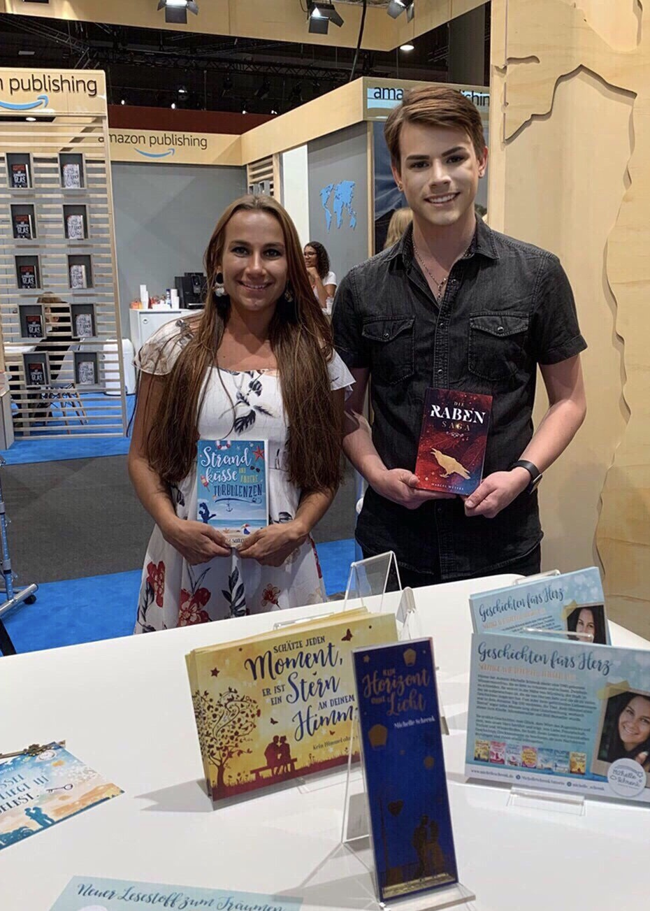 Michelle Schrenk und Marcel Weyers auf der Frankfurter Buchmesse 2018 am Amazon KDP Stand